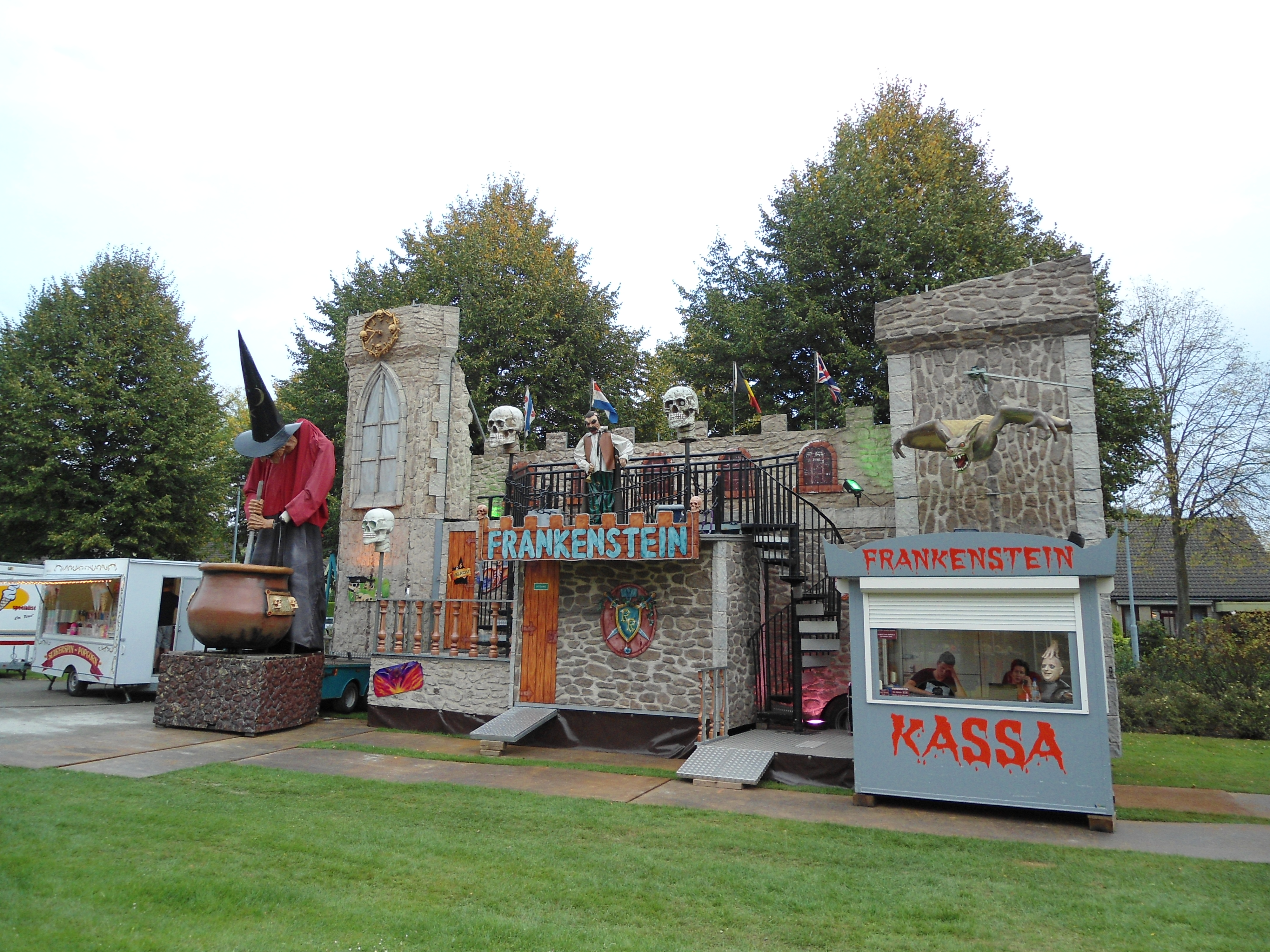 Loopspookhuis Frankenstein op de kermis te Acht